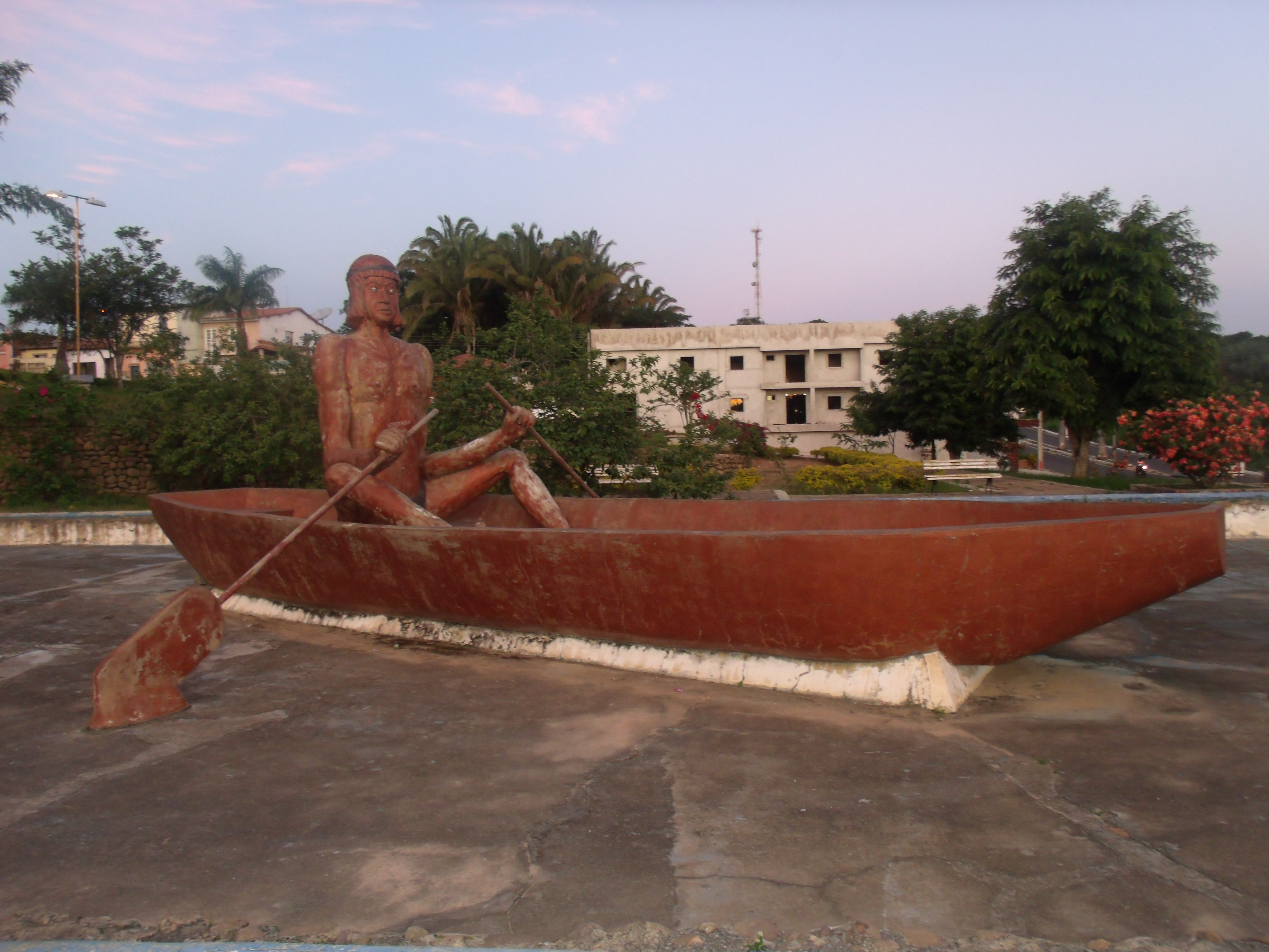 Monumento ao índio Ubajara, na rodoviária de Ubajara, no Ceará.